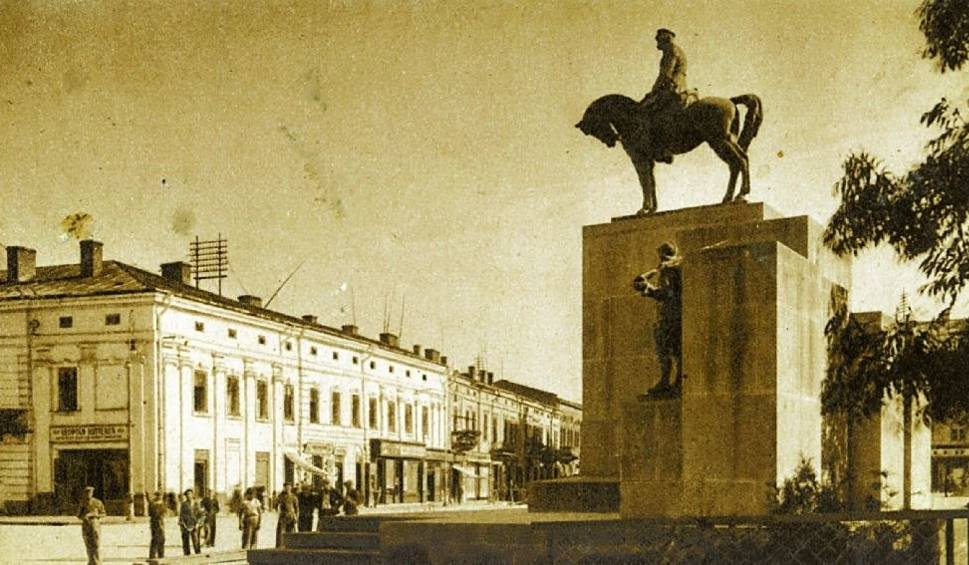 Пам’ятник Пілсудському на площі Собеського в Тарнополі (нині Майдан Волі).